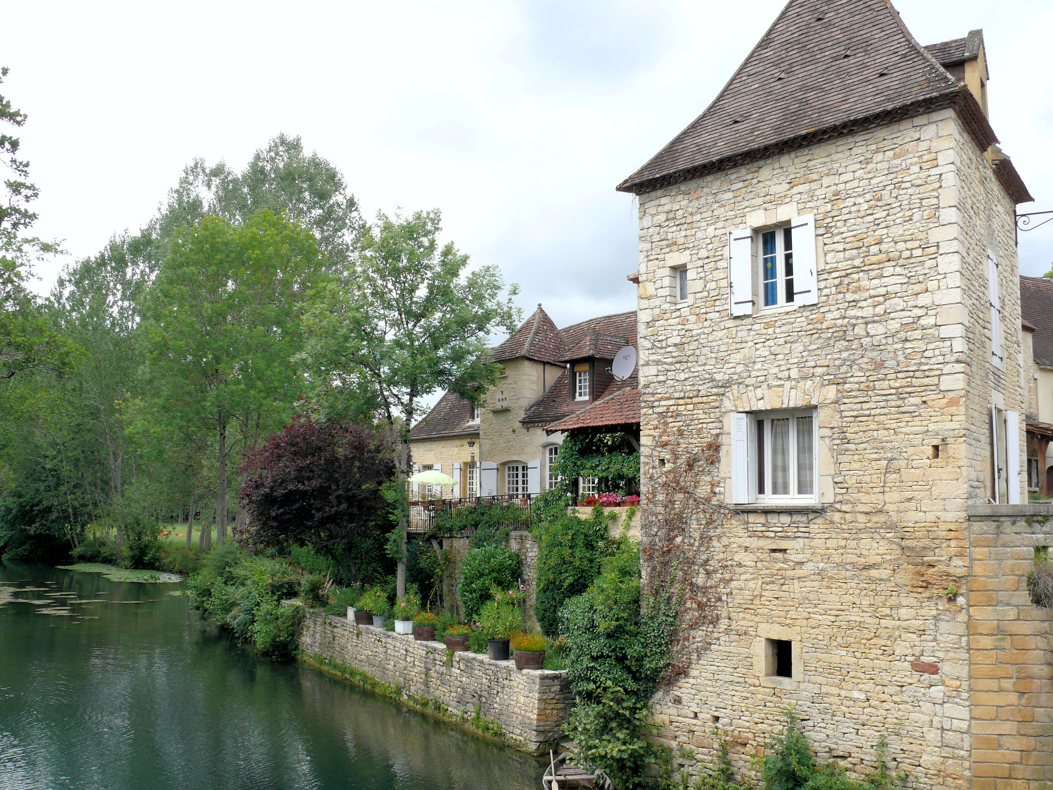 La vallée de la Céou à Bouzic